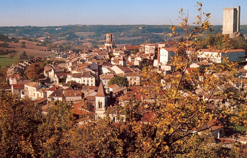 Montcuq, Lot, France